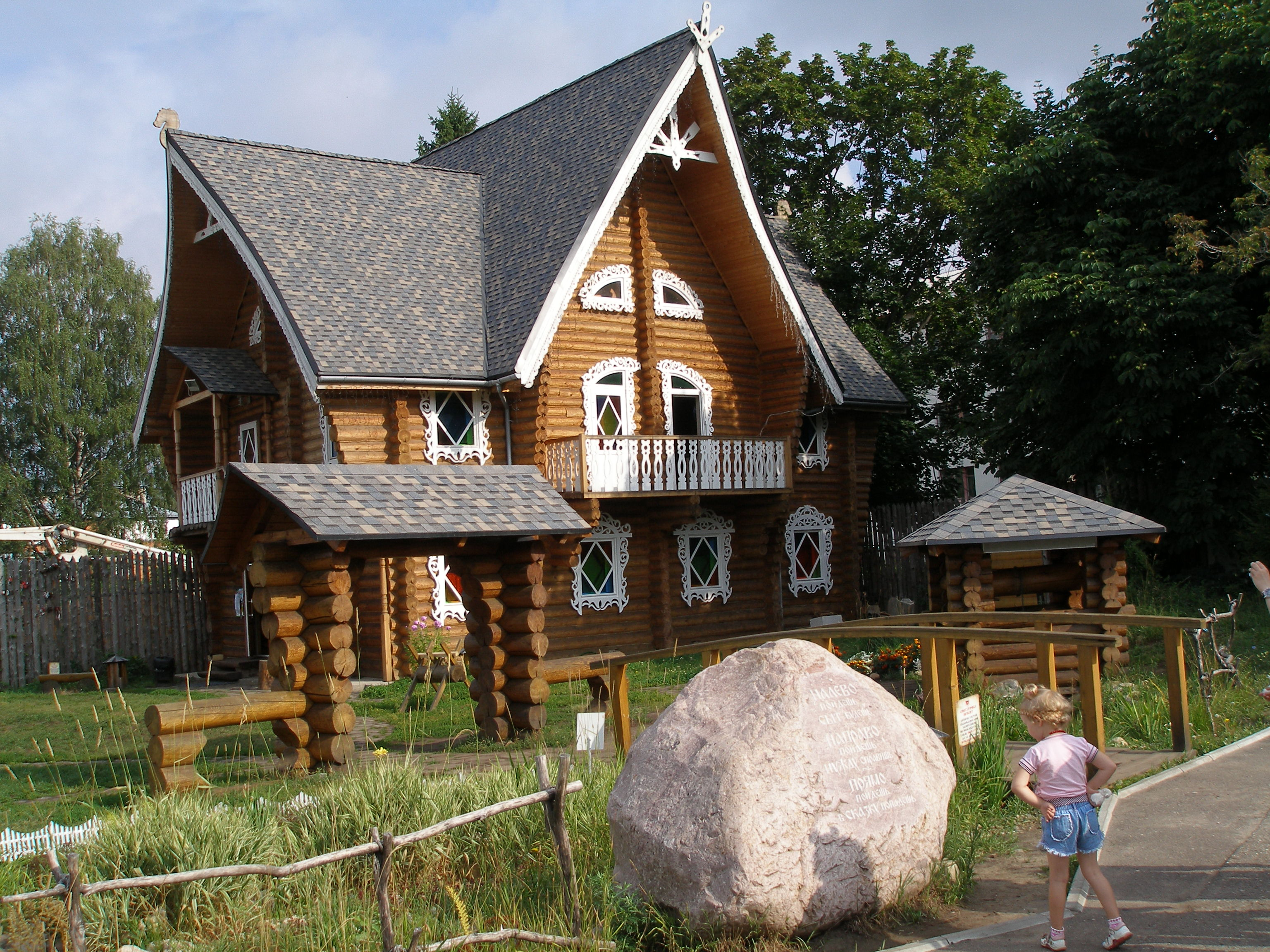 Резиденция Снегурочки в Костроме